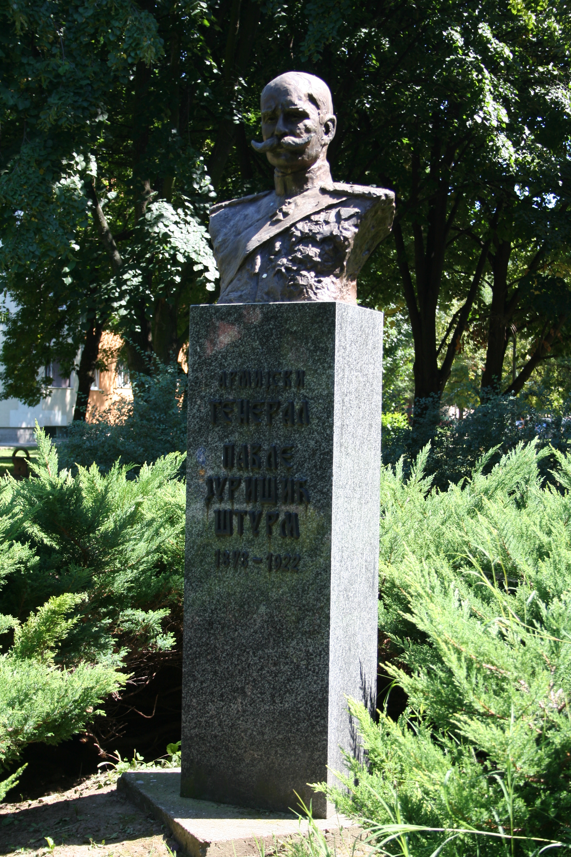 Spomenik Pavlu Jurišiću Šturmu, Loznica